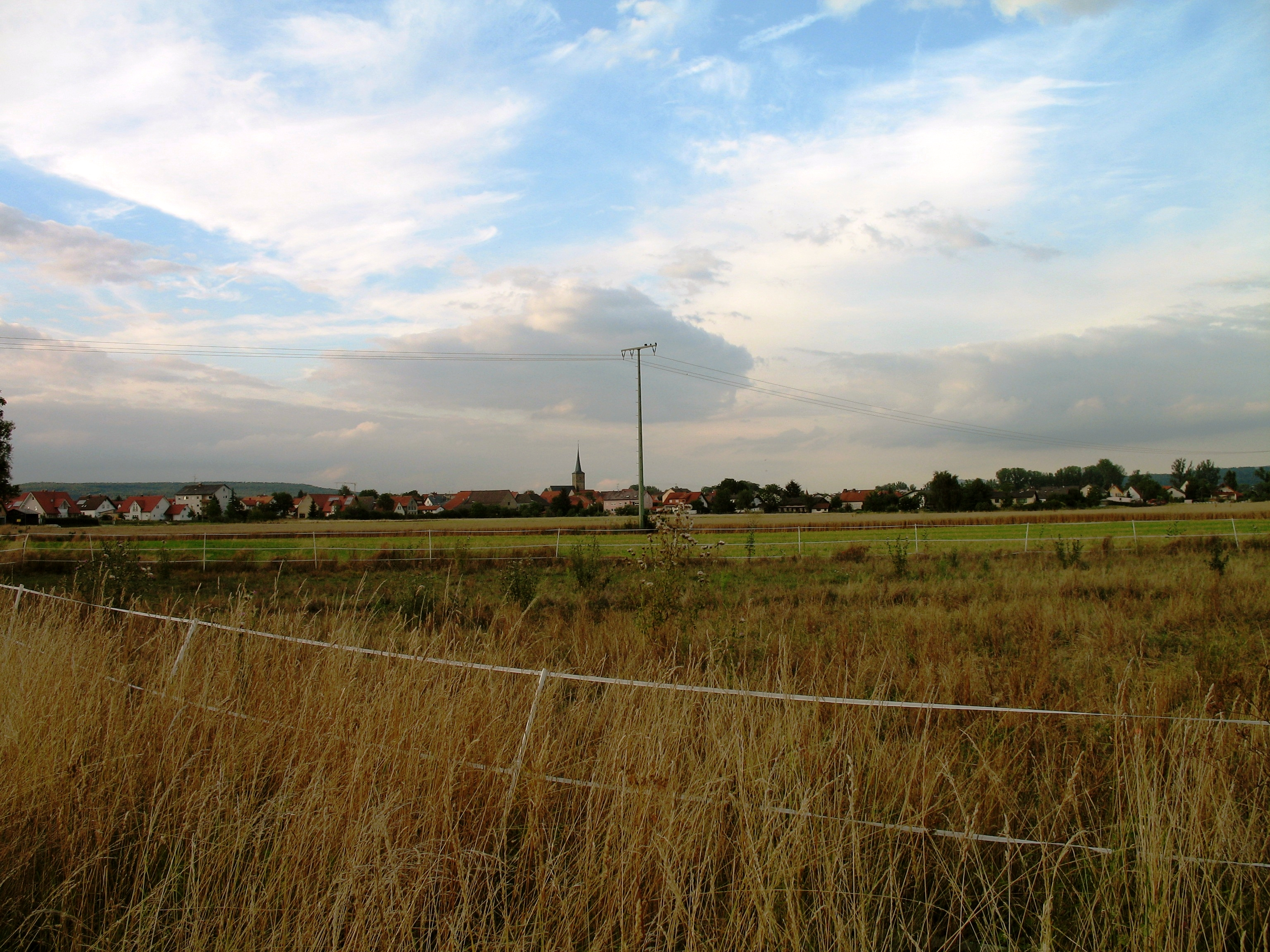 Ein Blick von Süden auf Ebing